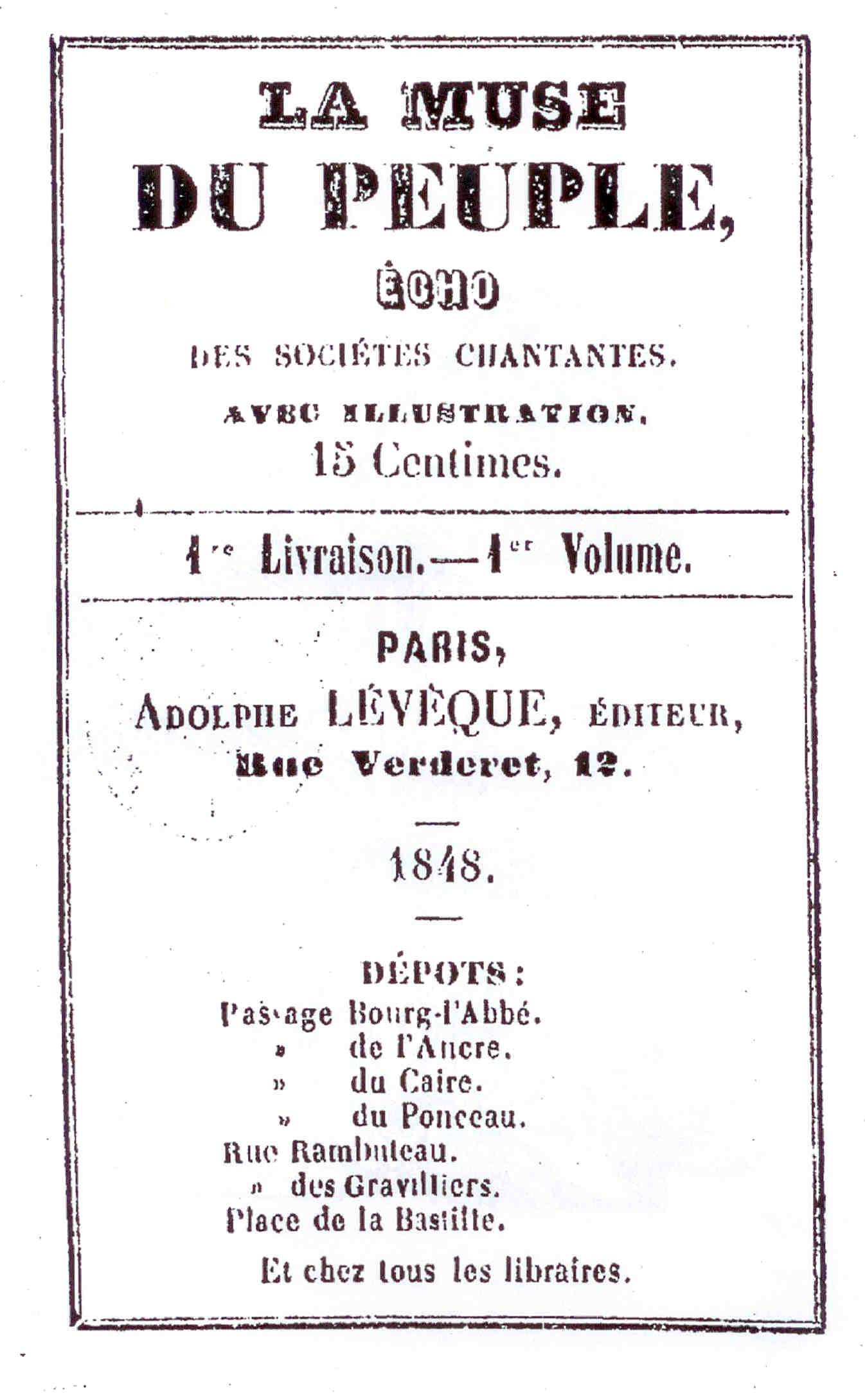 Couverture de l'unique numéro de La Muse du peuple.